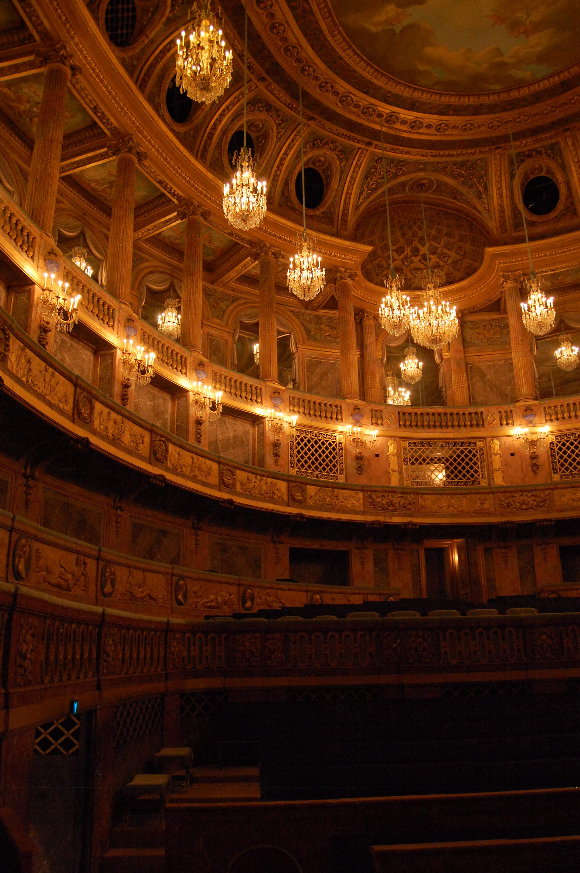 Vue de la salle de l'opéra du château de Versailles